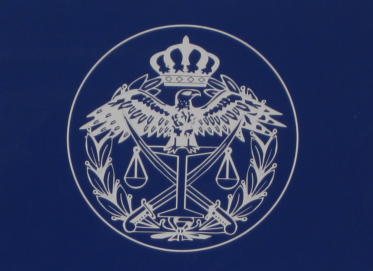 Politie in Jordanië